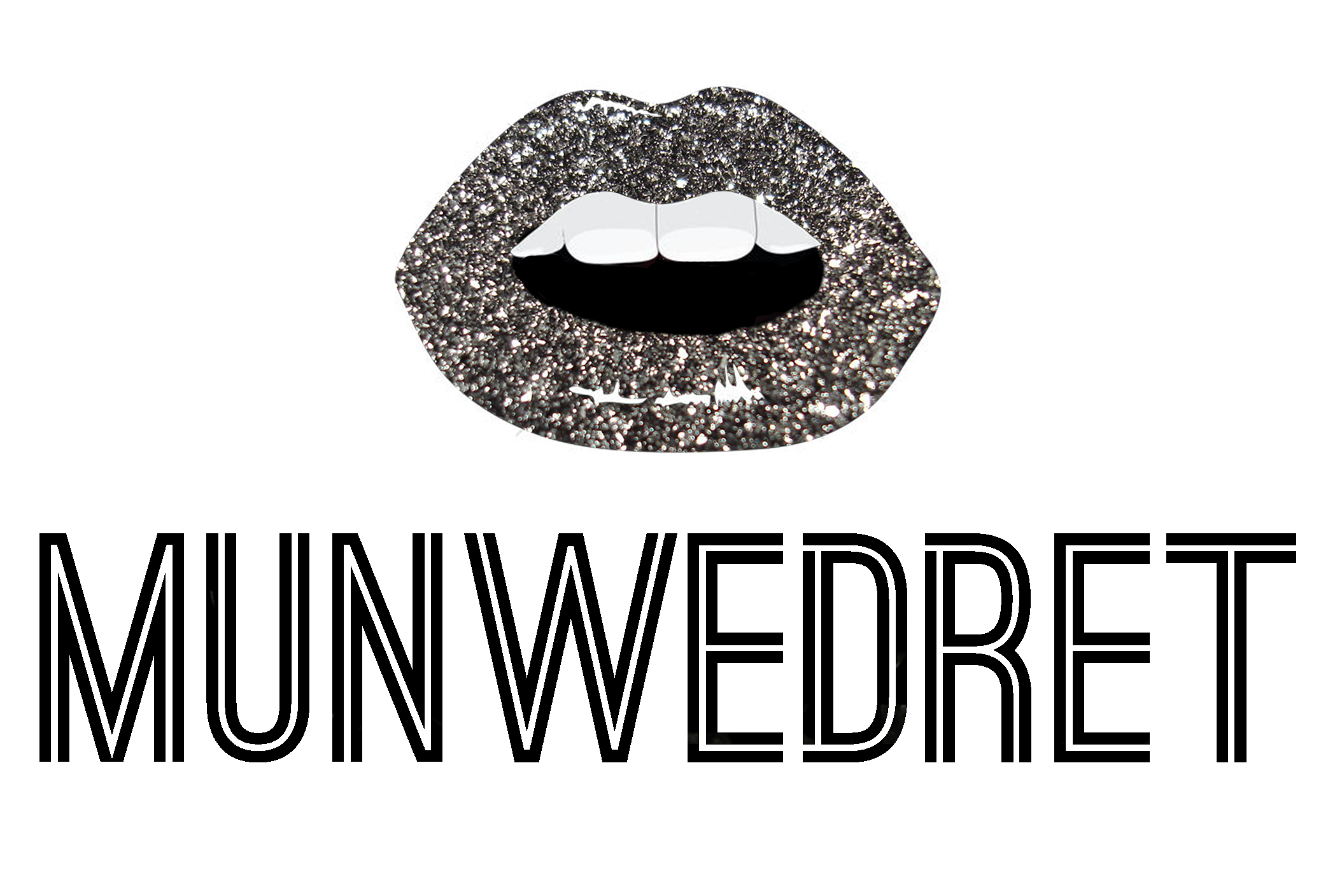 Bandets logga sedan 2016